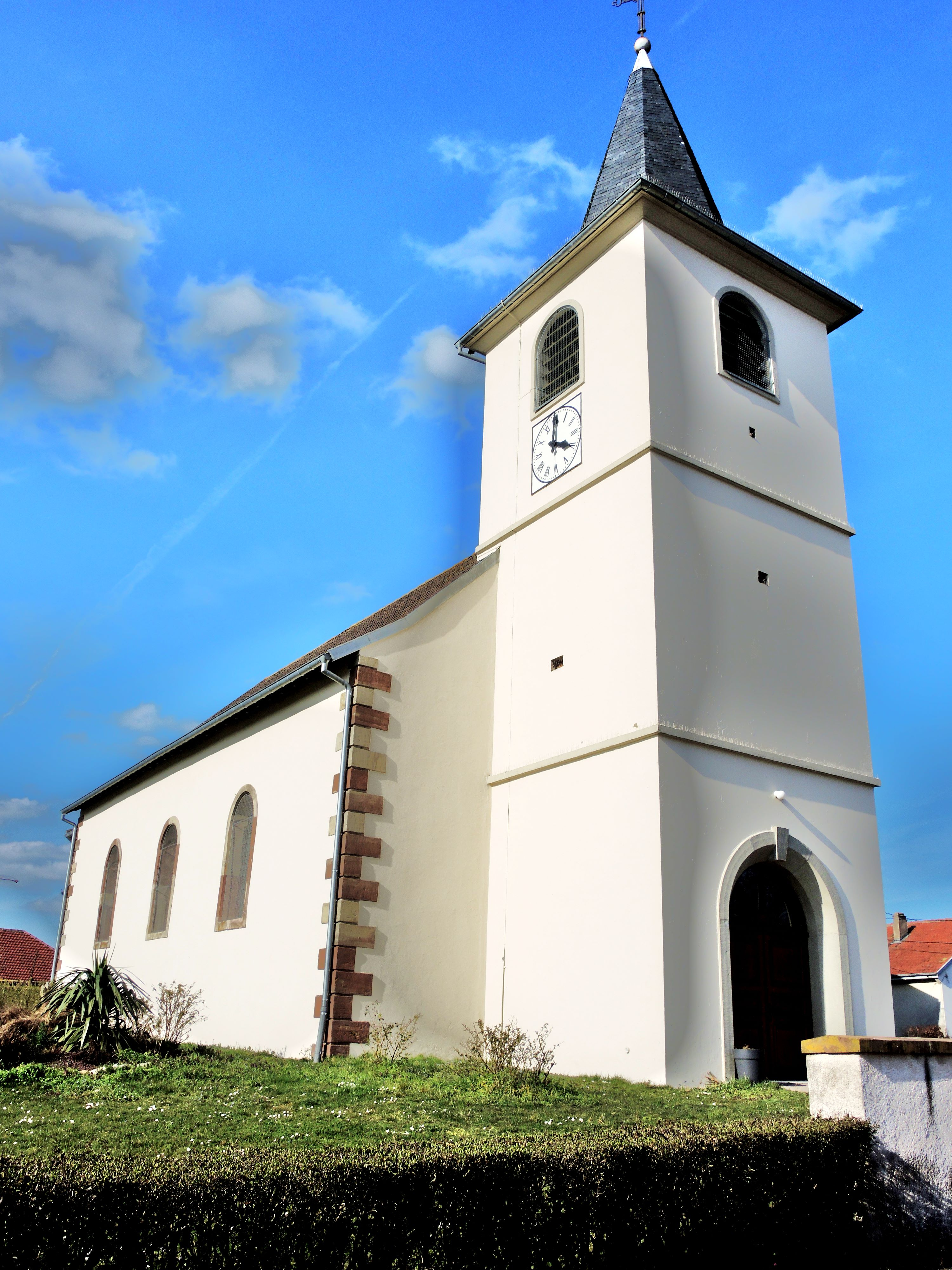 Eglise saint Adelphe du village de Languimberg.